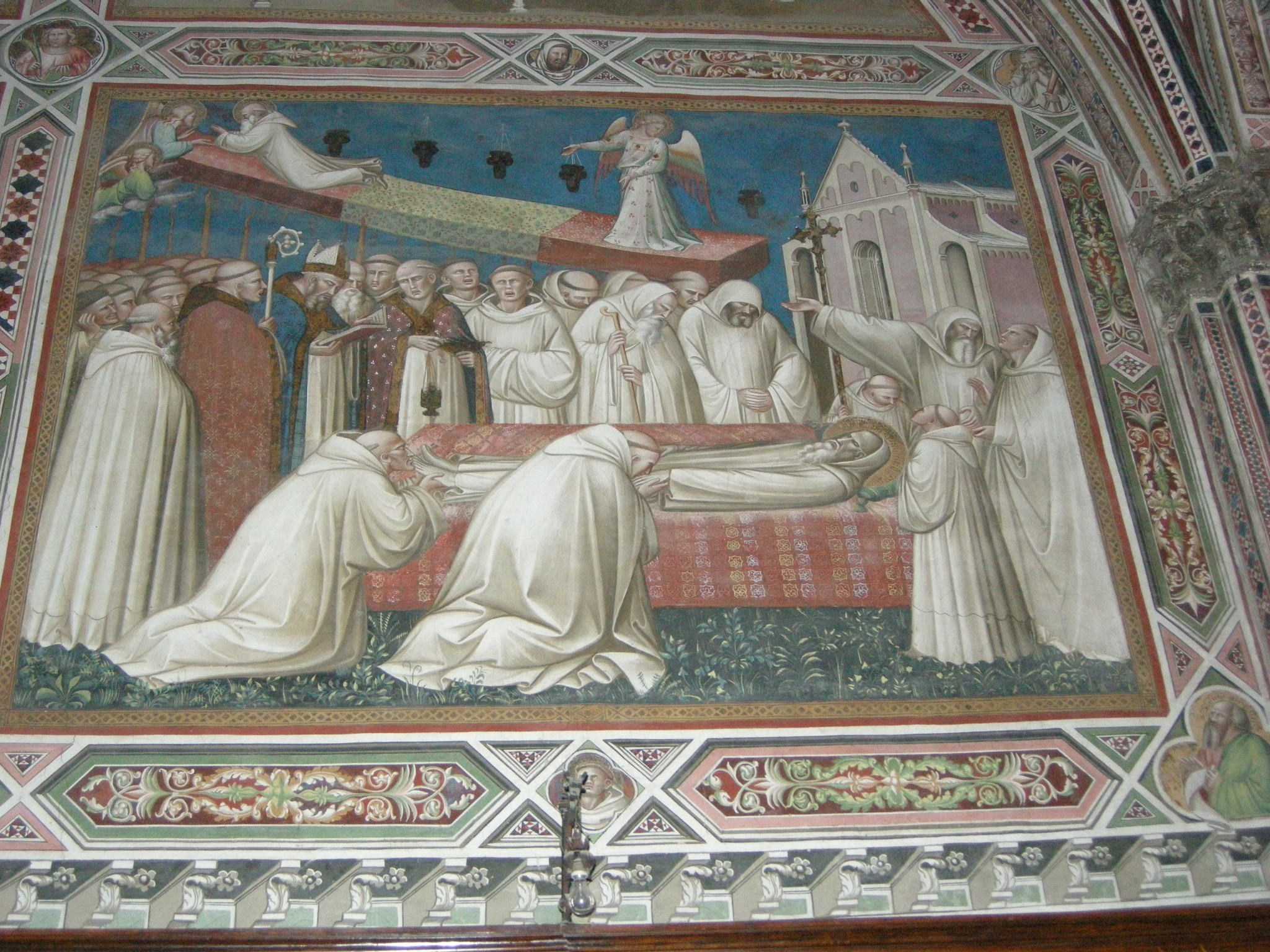 Spinello aretino, storie di san benedetto, episodio 16 Morte di San Bendetto che viene visto salire al cielo